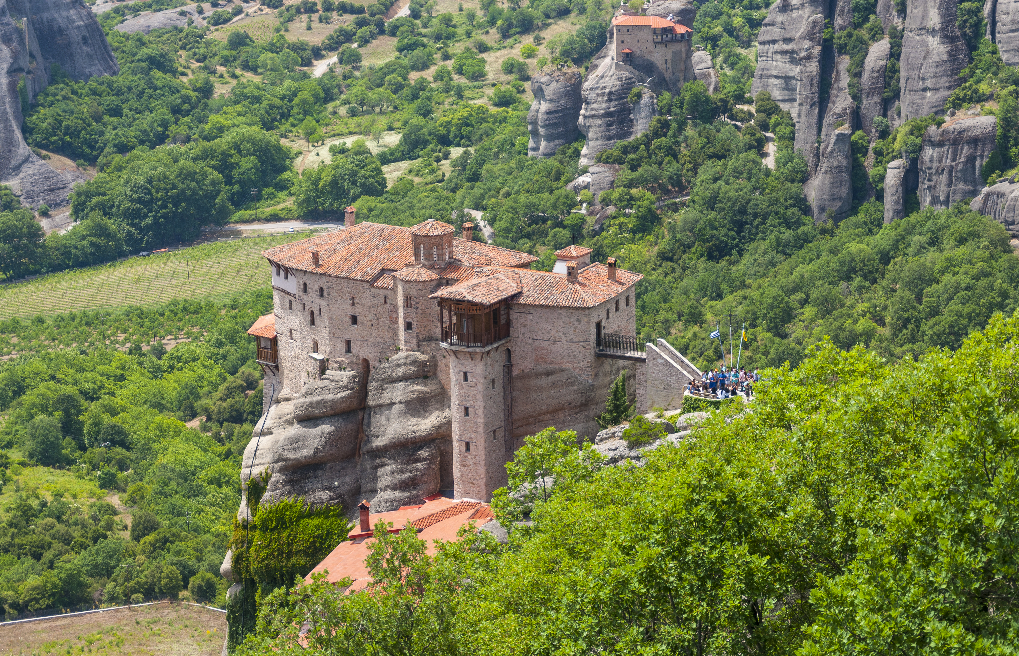 Μονή Ρουσάνου Μετεώρων«Μονή Ρουσάνου Μετεώρων»